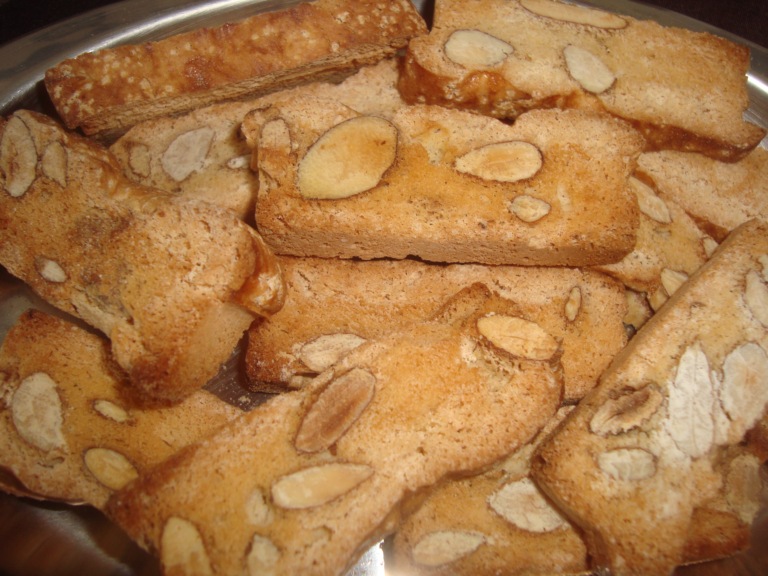 Els anomenats "Rosegons" és un dolç típic de la Comunitat Valenciana fet amb massa de farina, ou, sucre i ametlles, es caracteritza per tenir una consistència molt dura un cop fornejat per segona vegada.